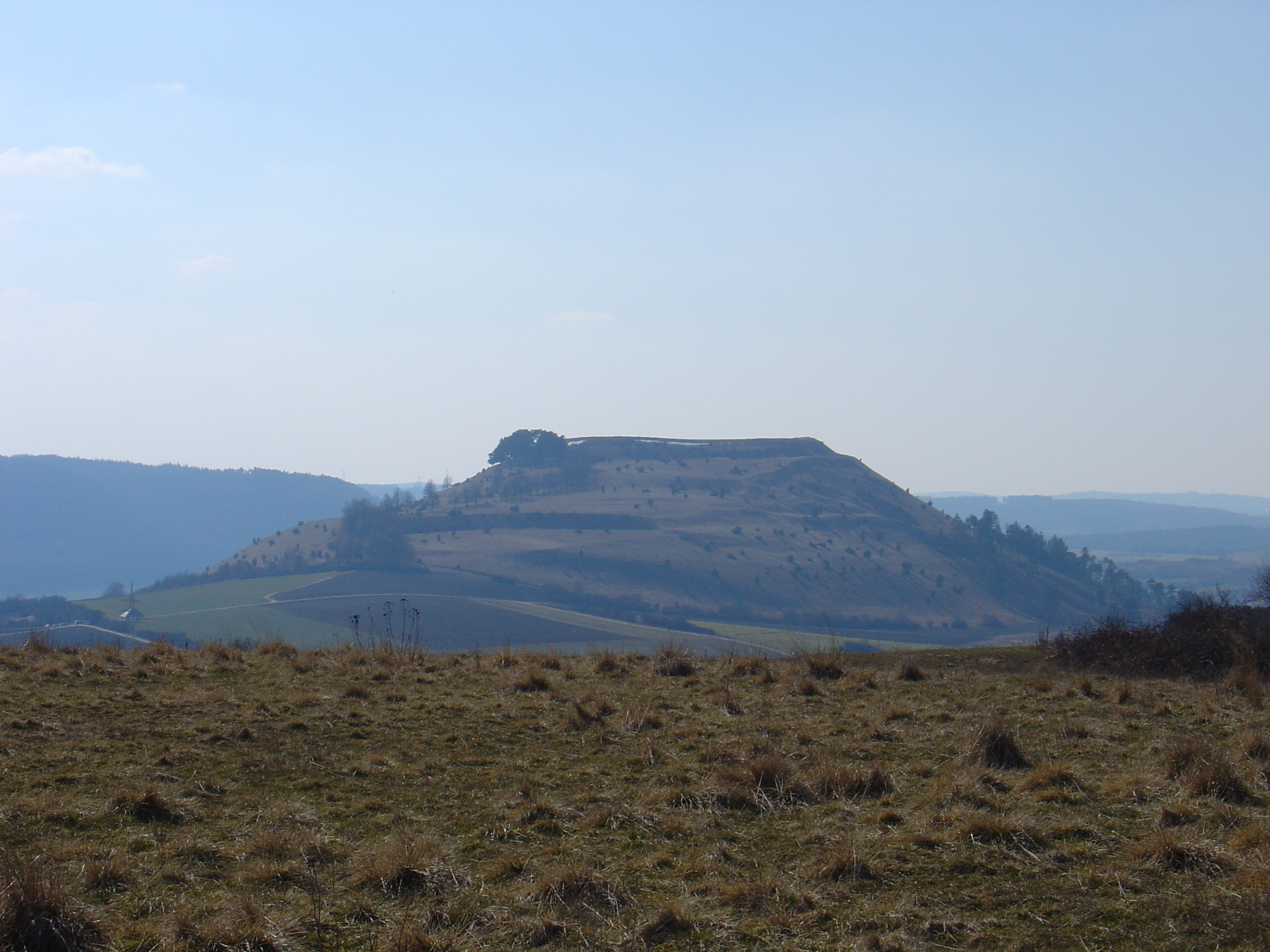 (NSG:BW-1.111)_Ipf, (NSG:BW-1.179)_Blasienberg, Der Ipf vom Blasienberg aus gesehen